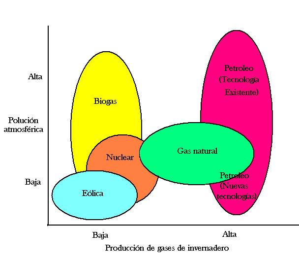 Grafico de la polución atmosférica de diversas fuentes de generación de energía aléctrica. Recopilador: Alfredobi, con base en: (pagina 14. (Documento de reproducción libre citando la fuente.)